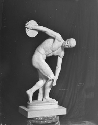 Discobolo di Castelporziano, calco ricostruttivo in gesso effettuato da Giulio Emanuele Rizzo, Museo Nazionale Romano, Roma